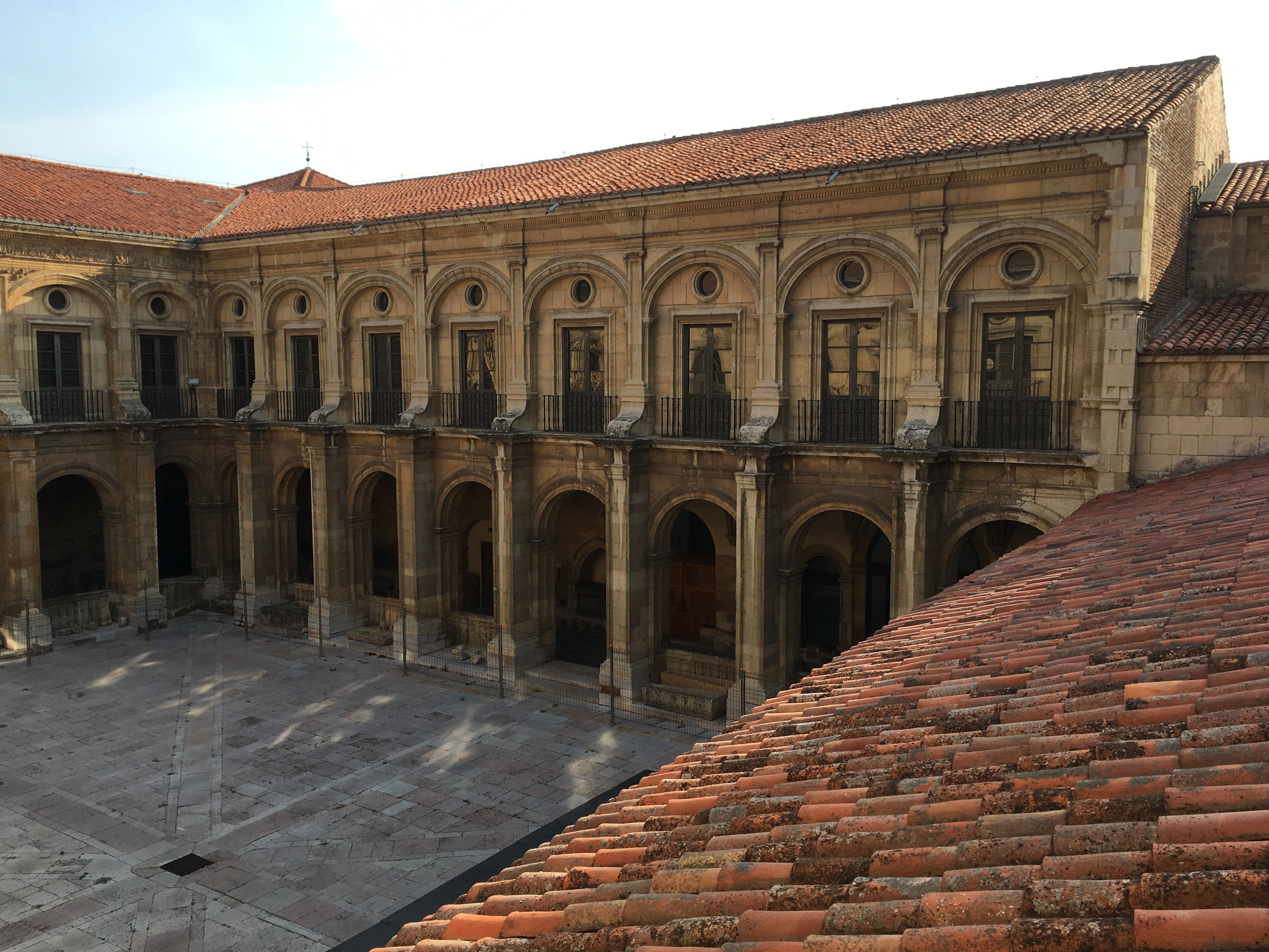 Claustro de la colegiata de San Isidoro en León.